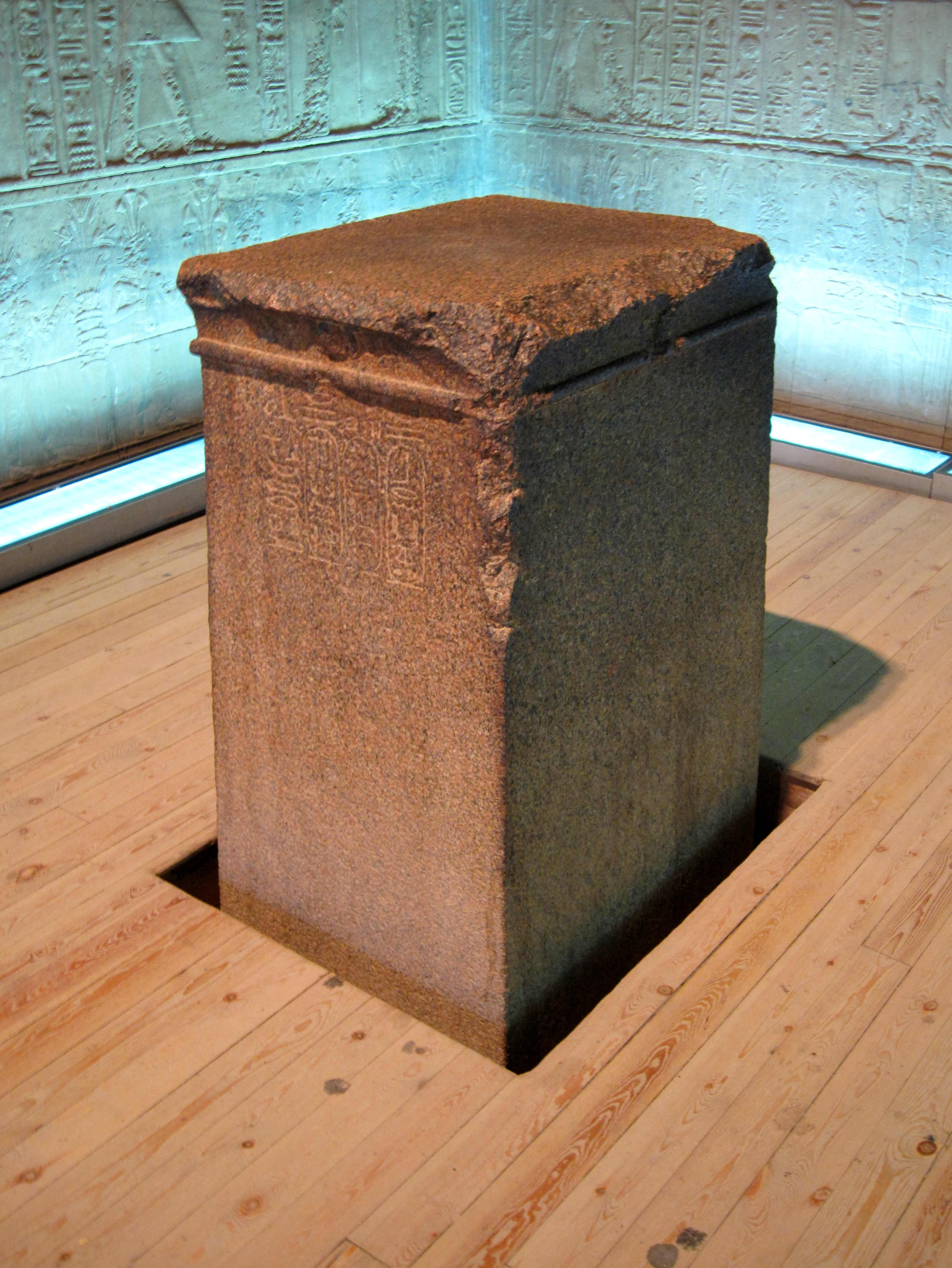 Heiligtum im Isis-Tempel von Philae auf der Insel Agilkia, Ägypten